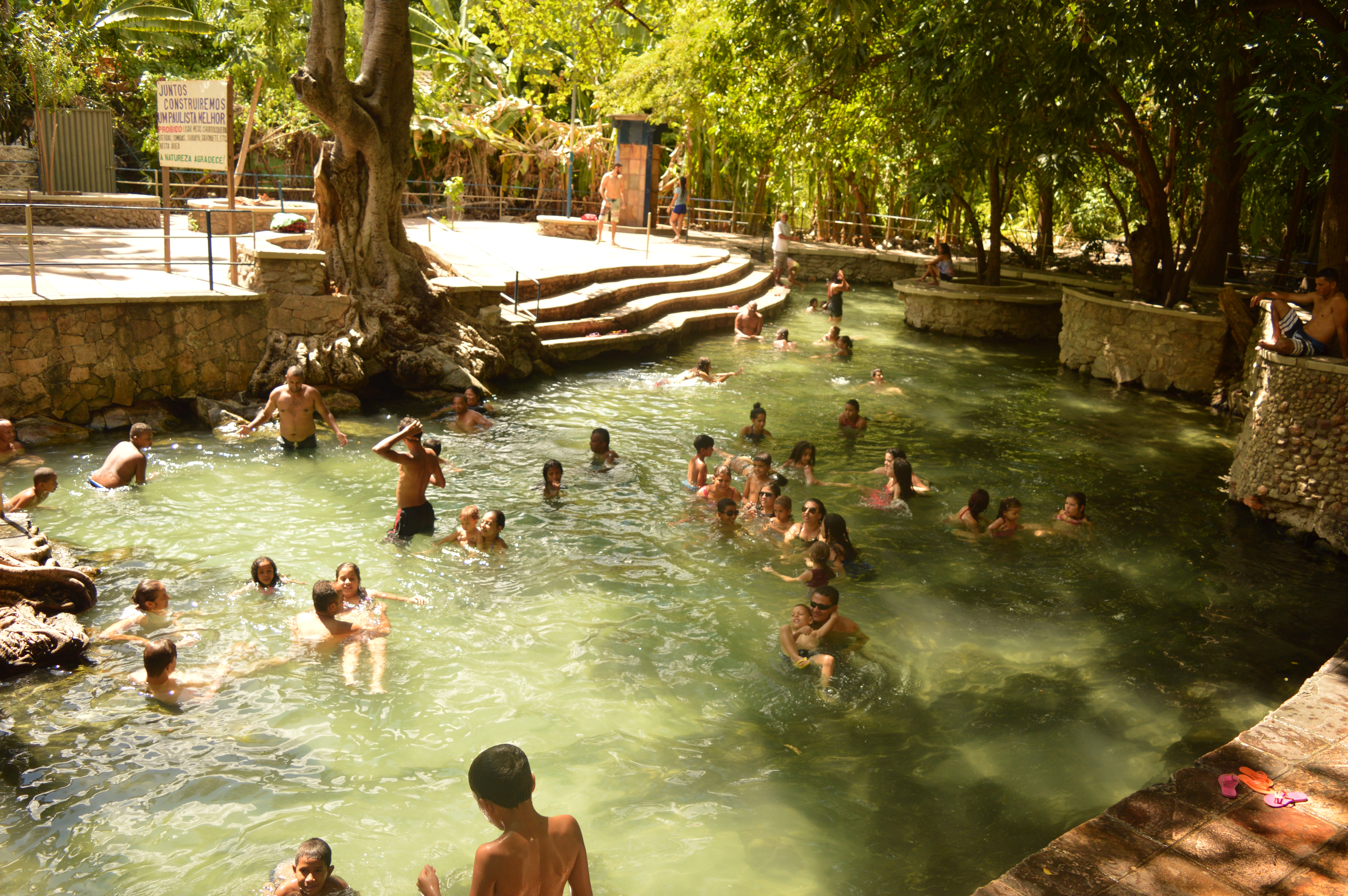 Banhistas em Águas do Paulista em Paratinga. Foto de 18 de janeiro de 2017.